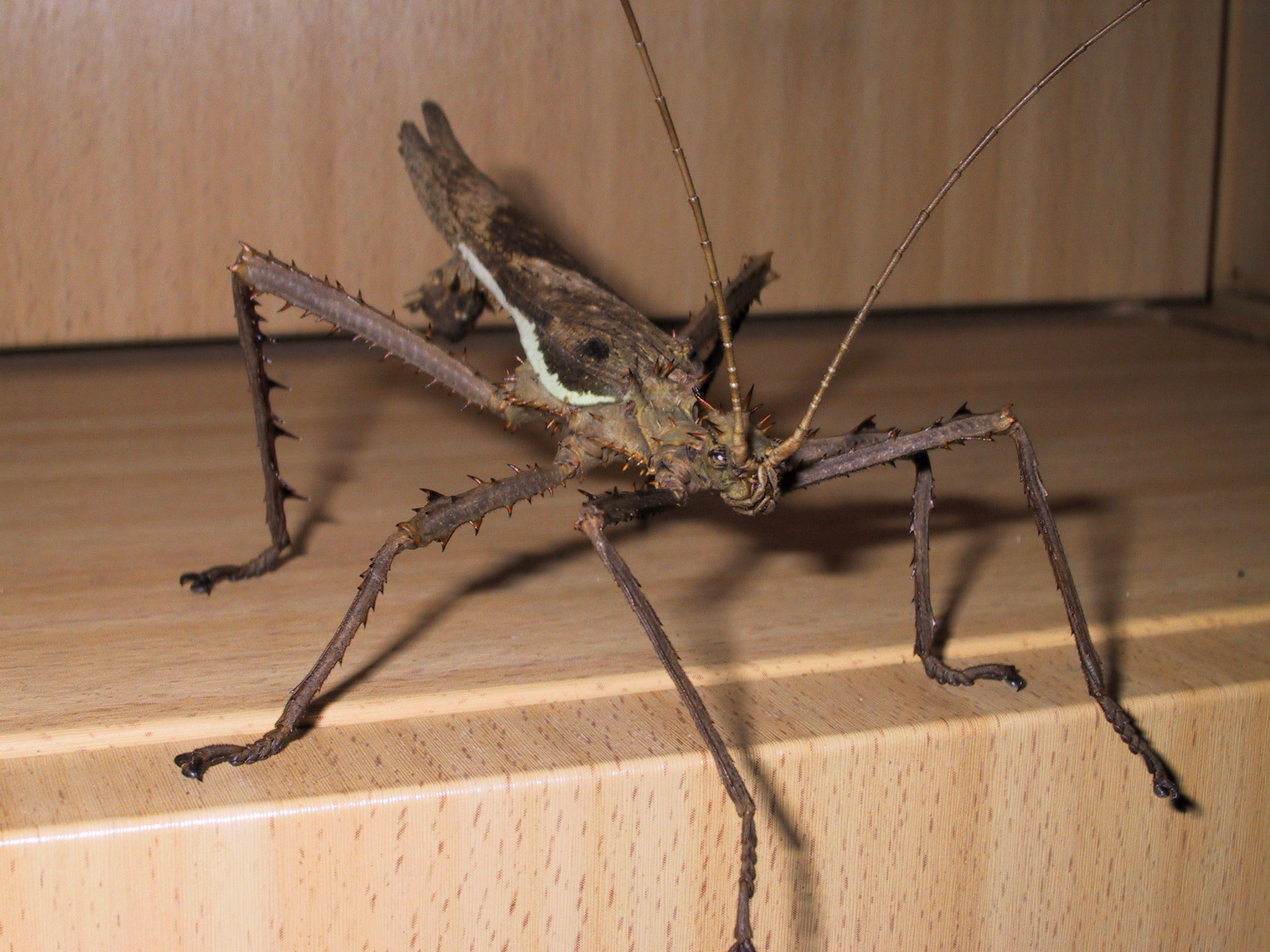 Heteropteryx dilatata - male